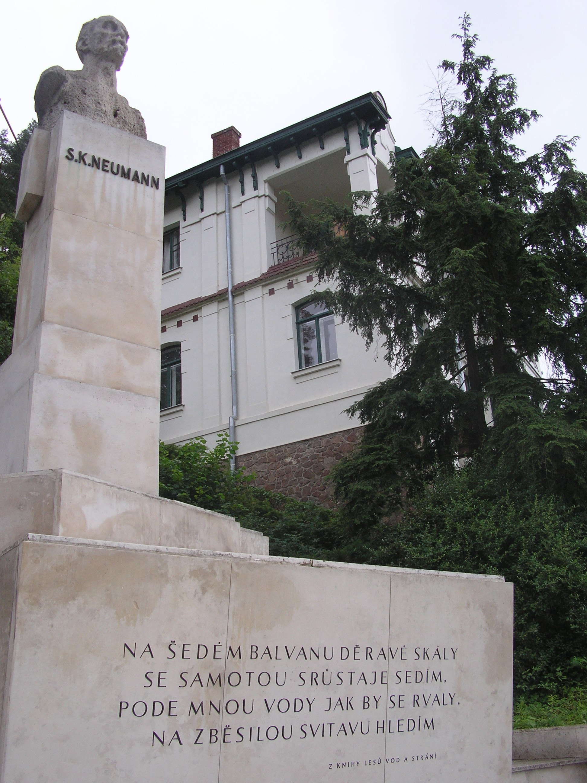 Památník S. K. Neumanna v Bílovicich nad Svitavou